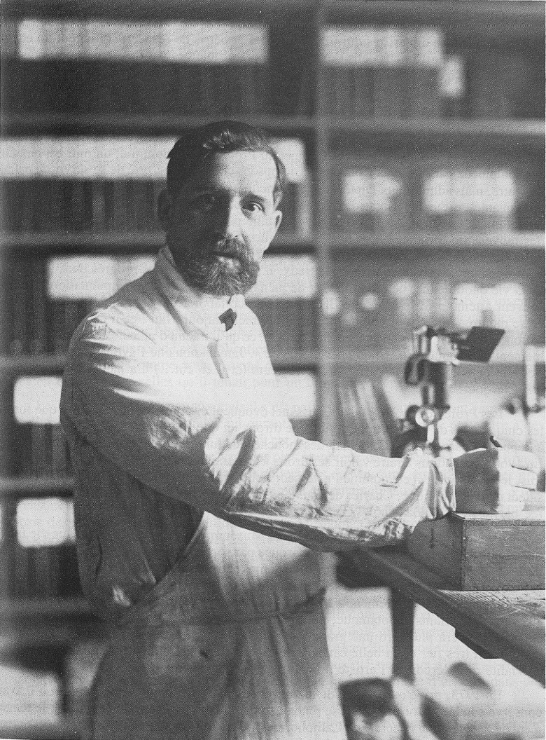 Eugène Séguy (1890-1985) dans son laboratoire, en 1934